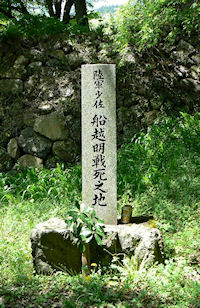 顕彰碑を投稿者が撮影したものである。